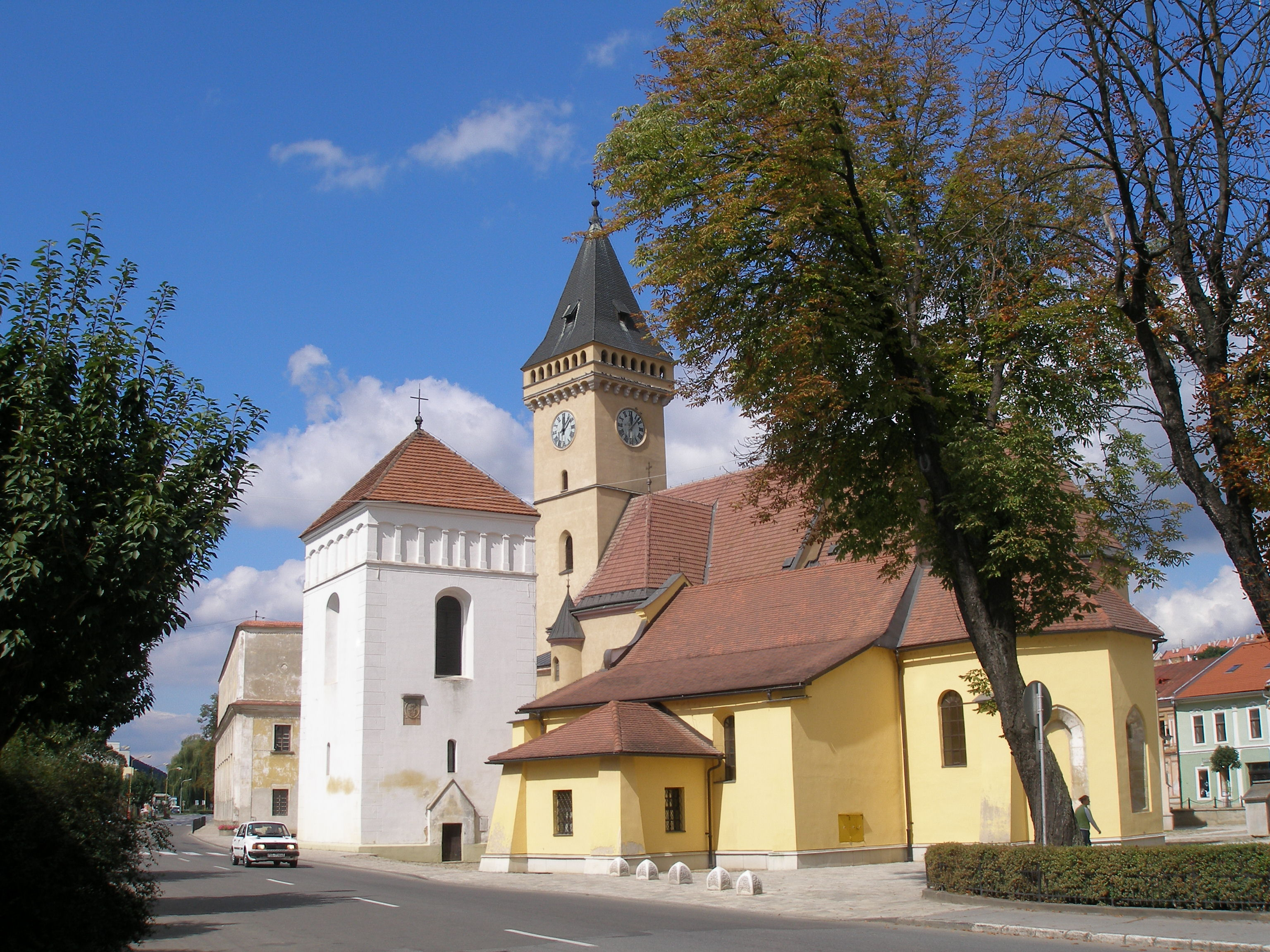 Sabinov starobylé bývalé slobodné kráľovské mesto na Slovensku. Dnes okresné mesto v regióne Šariš.